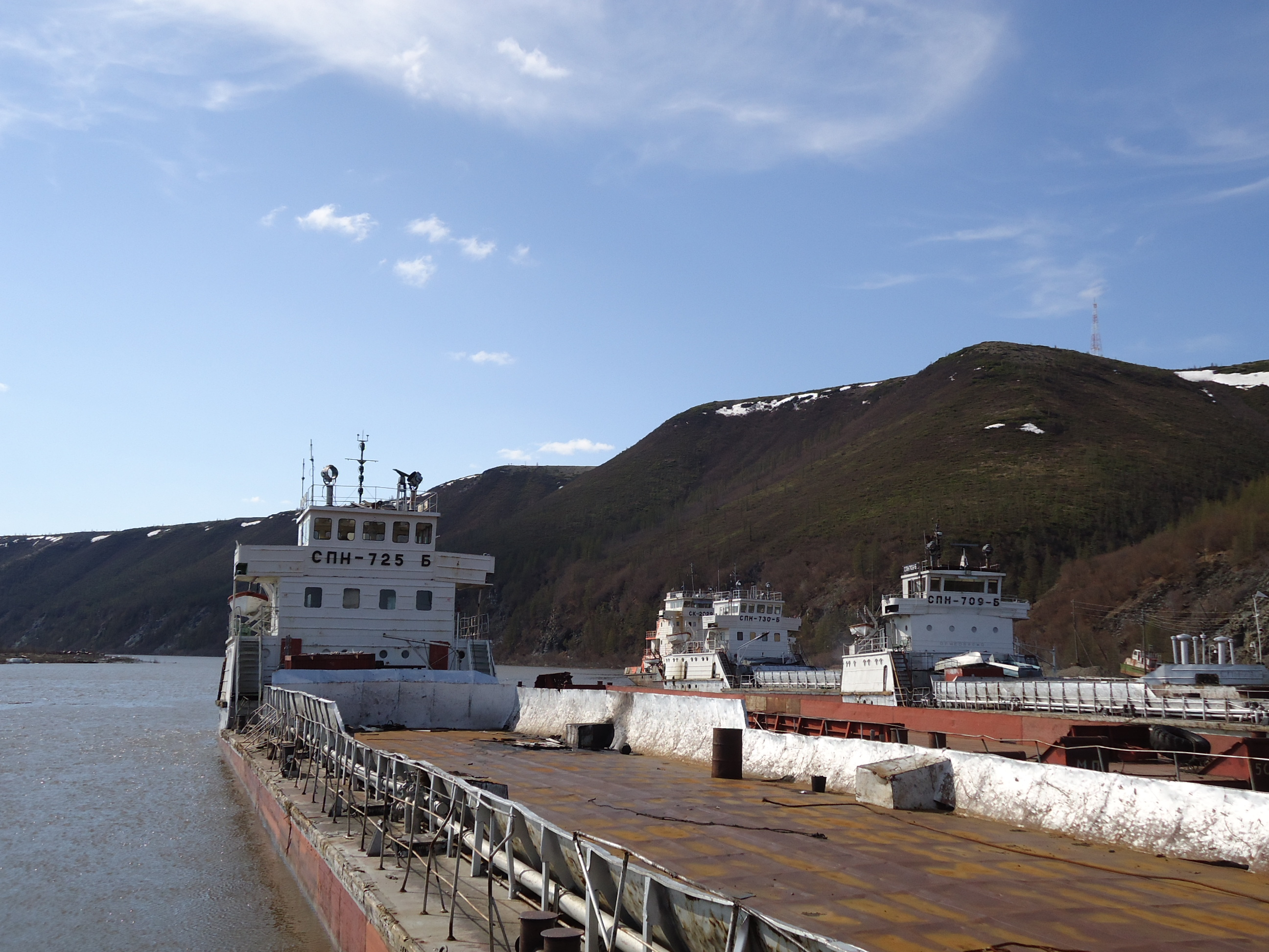 Затон